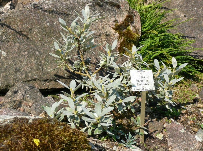 Botanischer Garten Erlangen, 2008